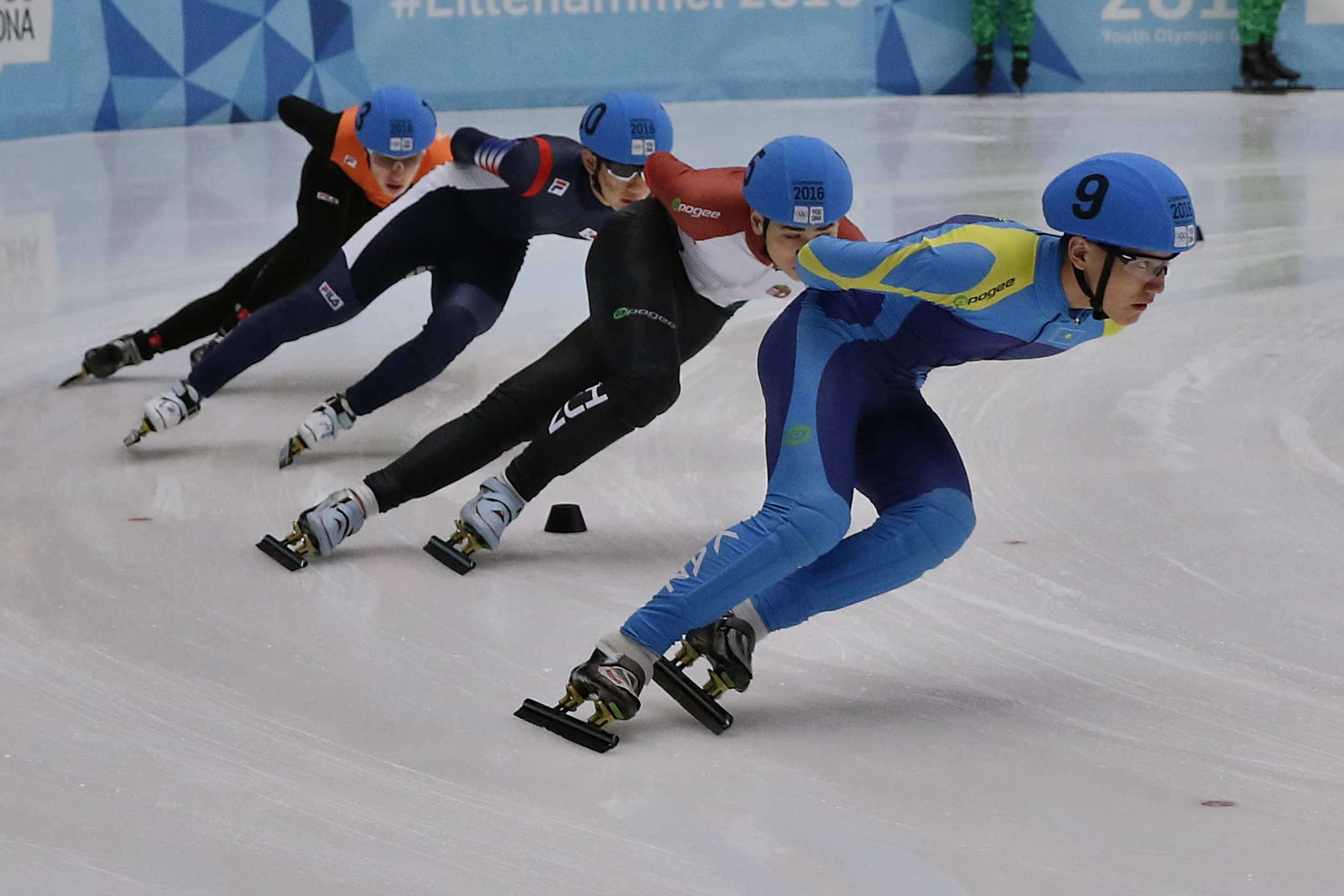 Lillehammer 2016 - Short track 1000m - Men Quaterfinals - Shaoang Liu, Kyunghwan Hong, Tjerk De Boer and Yerkebulan Shamukhanov